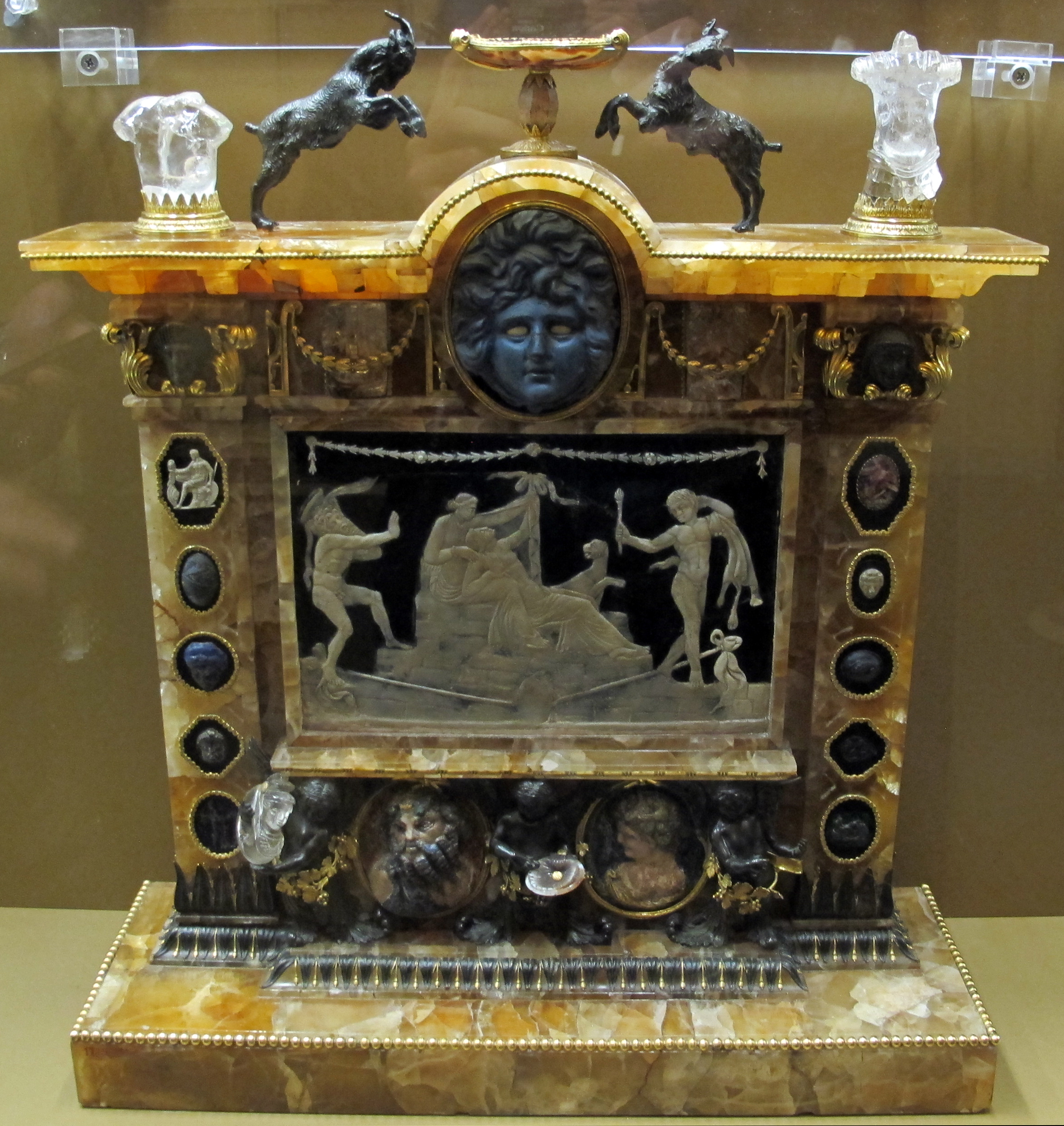 Sala delle Nozze Aldobrandini (Musei della biblioteca Apostolica Vaticana), esposizione temporanea (dicembre 2013) e collezione permanente